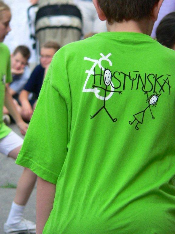 Triko ZŠ Hostýnská